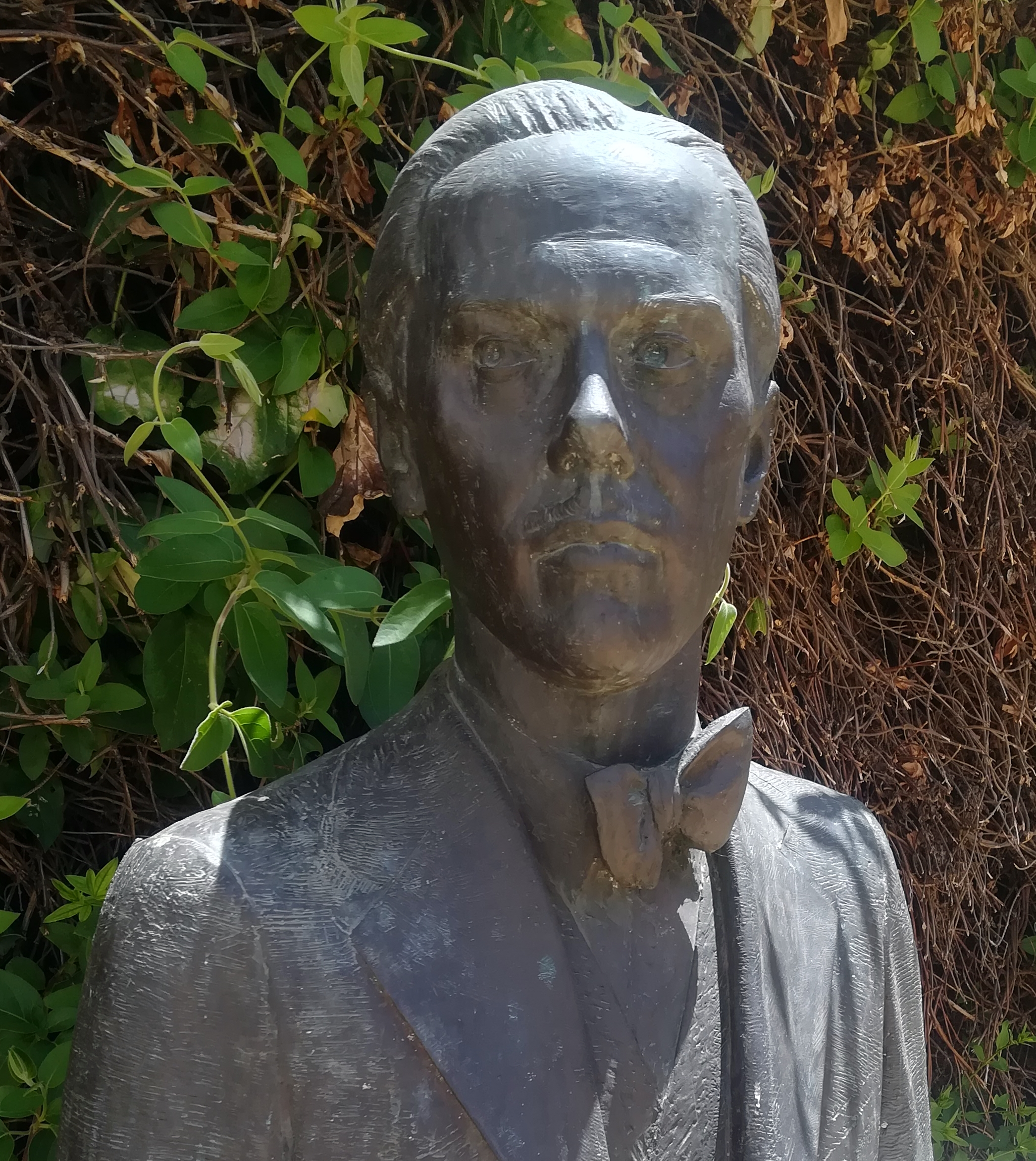 Luis Cernuda. Hacienda Montefuerte. Tomares, provincia de Sevilla, Andalucía, España.